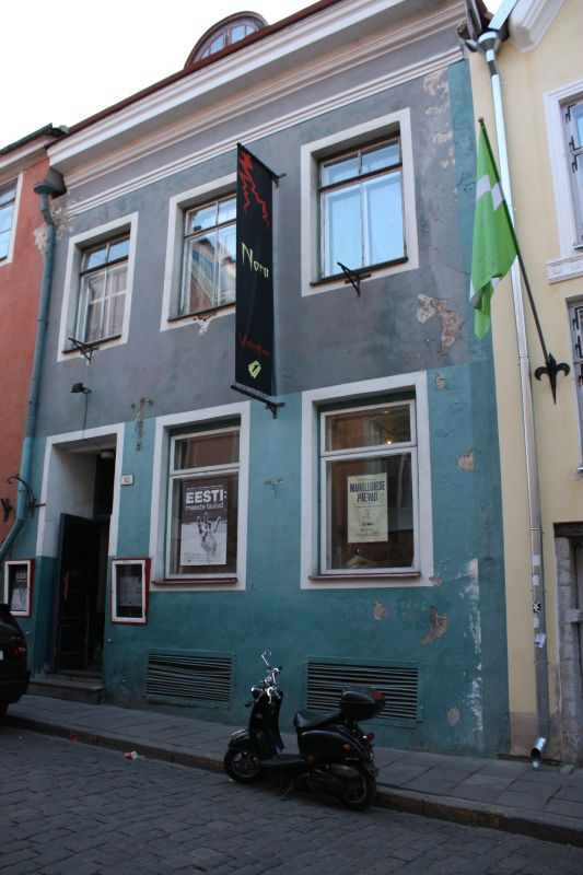 Von Krahli Teater. Tallinn.